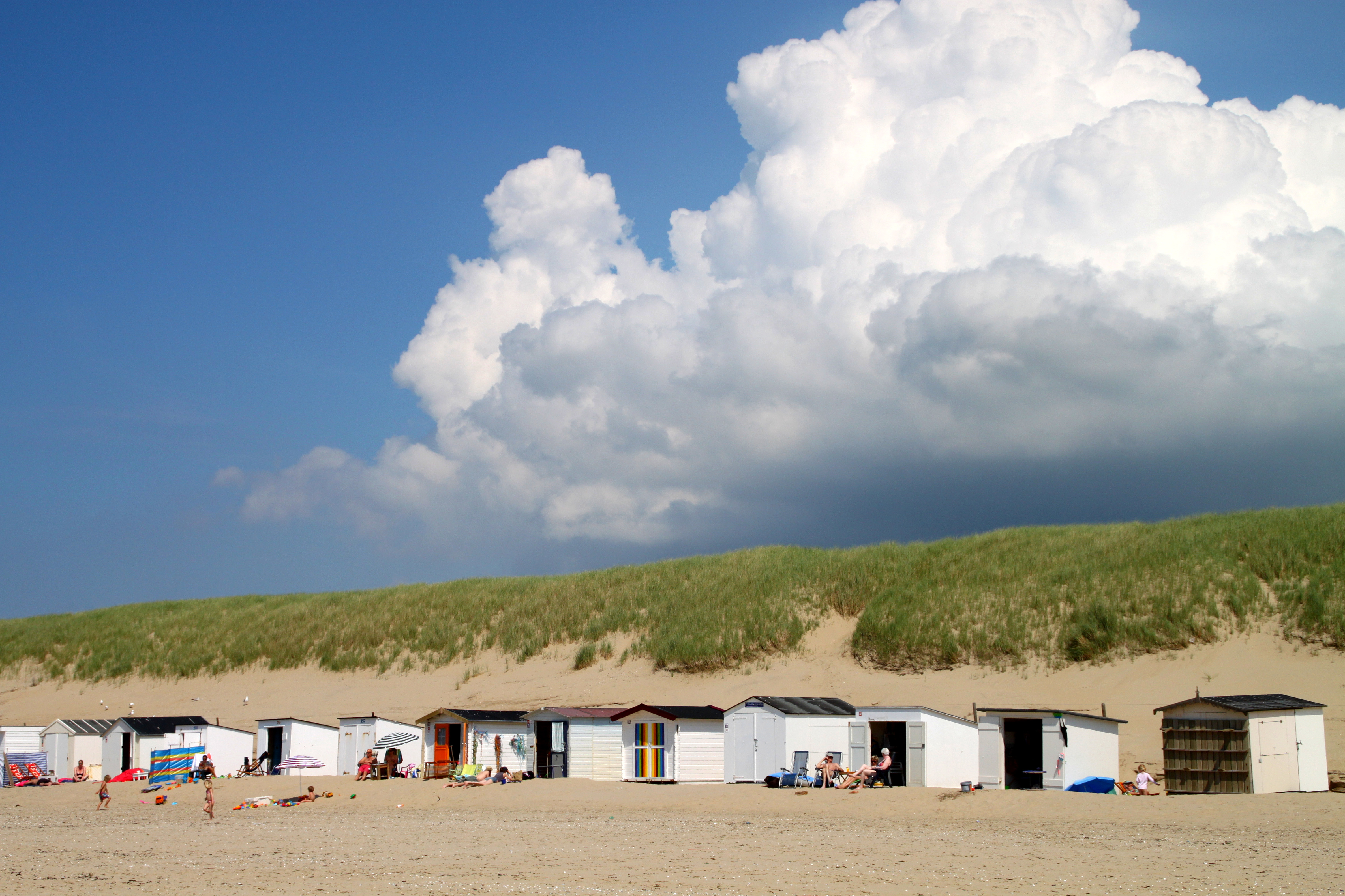 Texel - strand paal 9